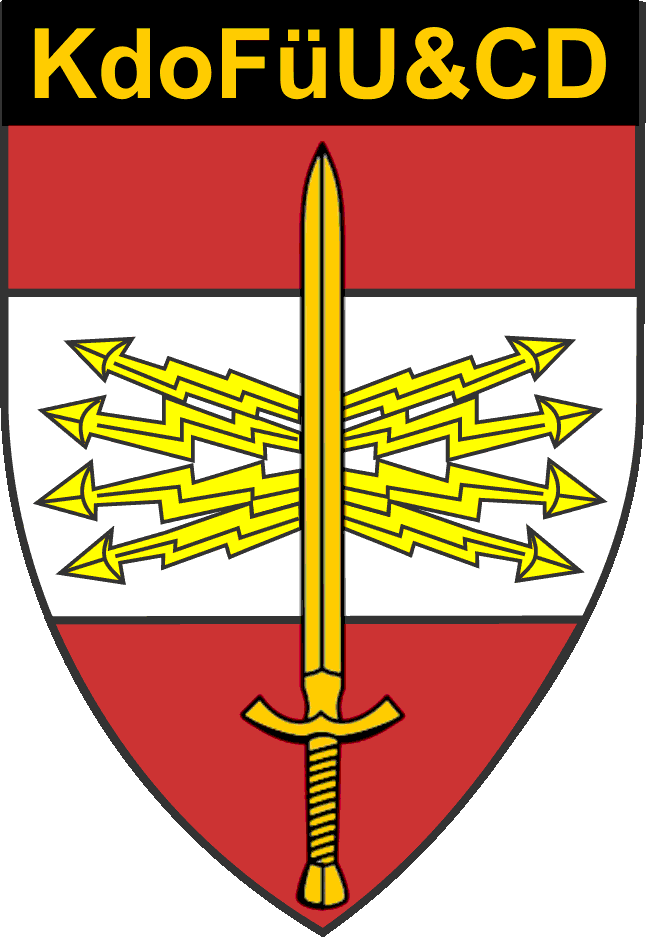 Mit dem mit der Spitze nach oben gerichteten Schwert und dem Blitzbündel wird die Rolle als Führungsunterstützungstruppe zum Ausdruck gebracht. Das Schwert symbolisiert die Selbstständigkeit des Kommandos, während das Blitzbündel als Zeichen für Übertragung und Kommunikation auf die Aufgaben in der elektronischen Kampfführung und im Cyber Defence-Bereich des Verbandes verweisen soll.